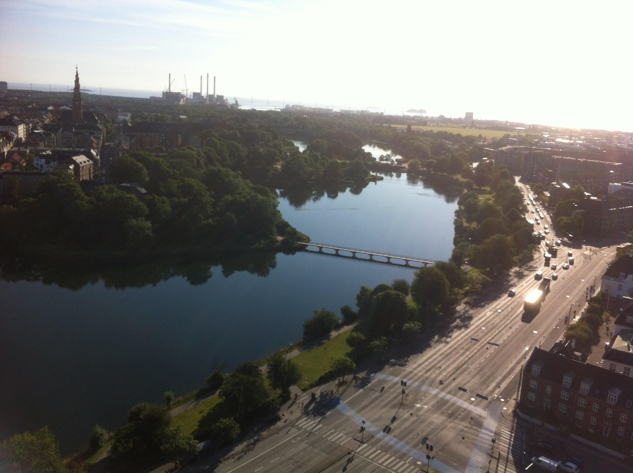 Amager Vest, Copenhagen, Denmark